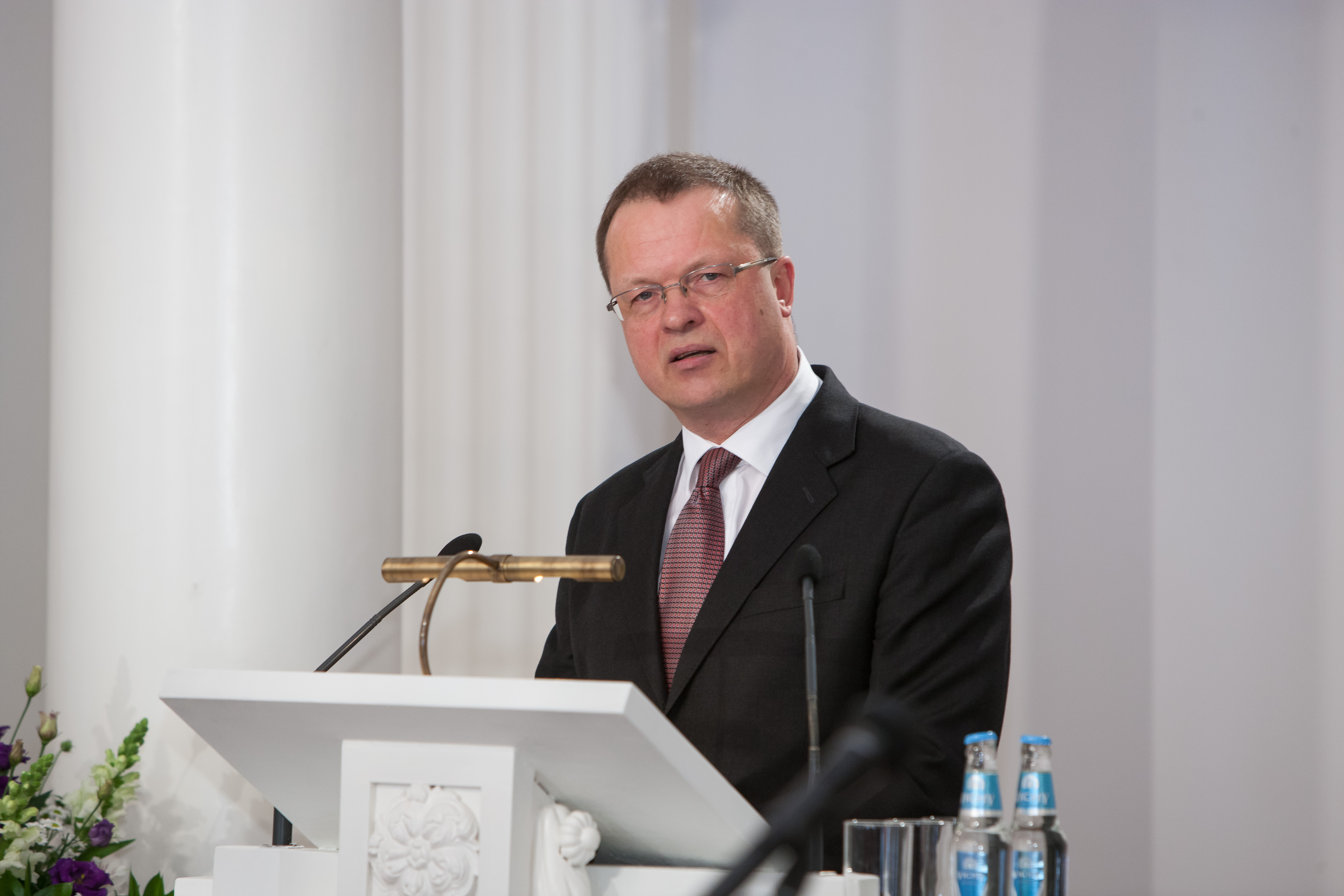 Tartu Ülikooli rektori valimised ülikooli aulas 31. mail 2012. TÜ rakubioloogia professor Toivo Maimets.